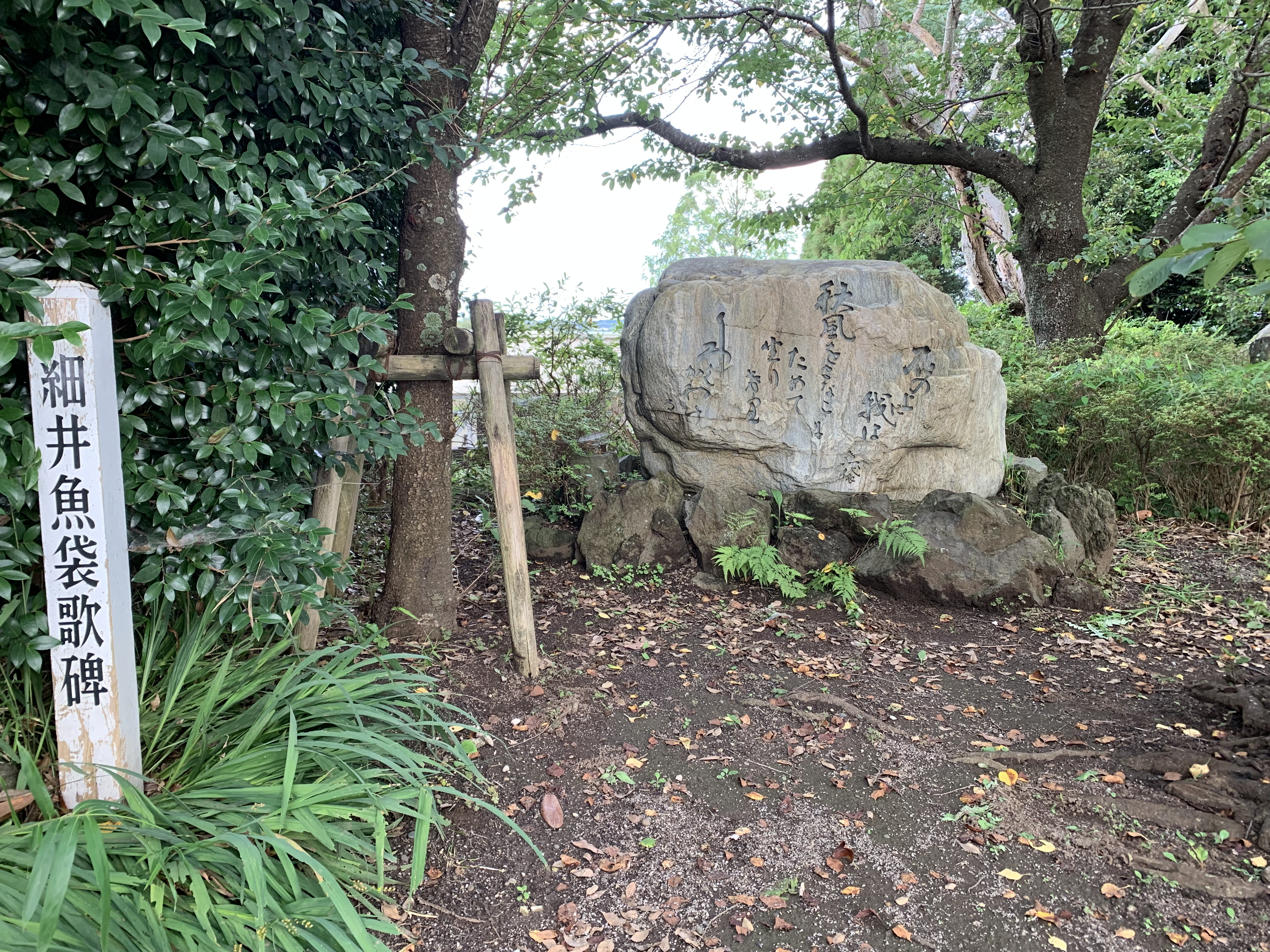 千葉県木更津市、太田山公園にある細井魚袋歌碑。1957年建立。（2019年7月撮影）